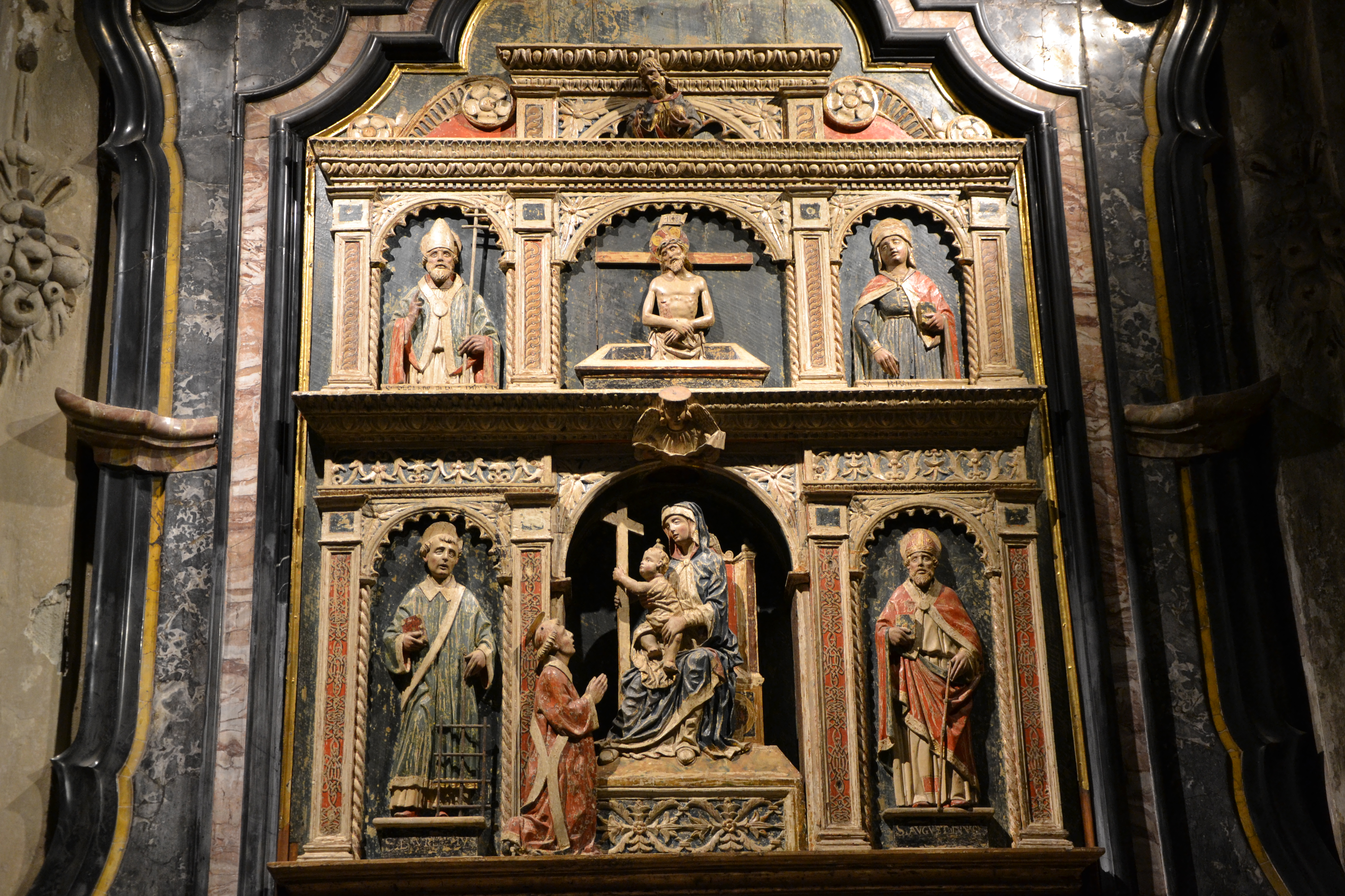 San Michele Maggiore (Pavia)